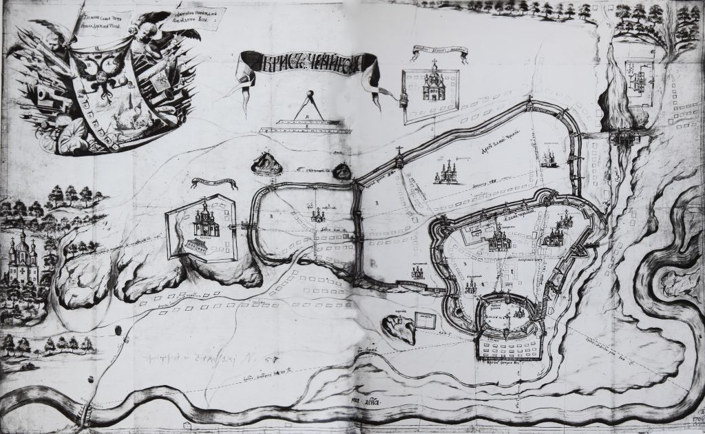 Перша мапа Чернігова